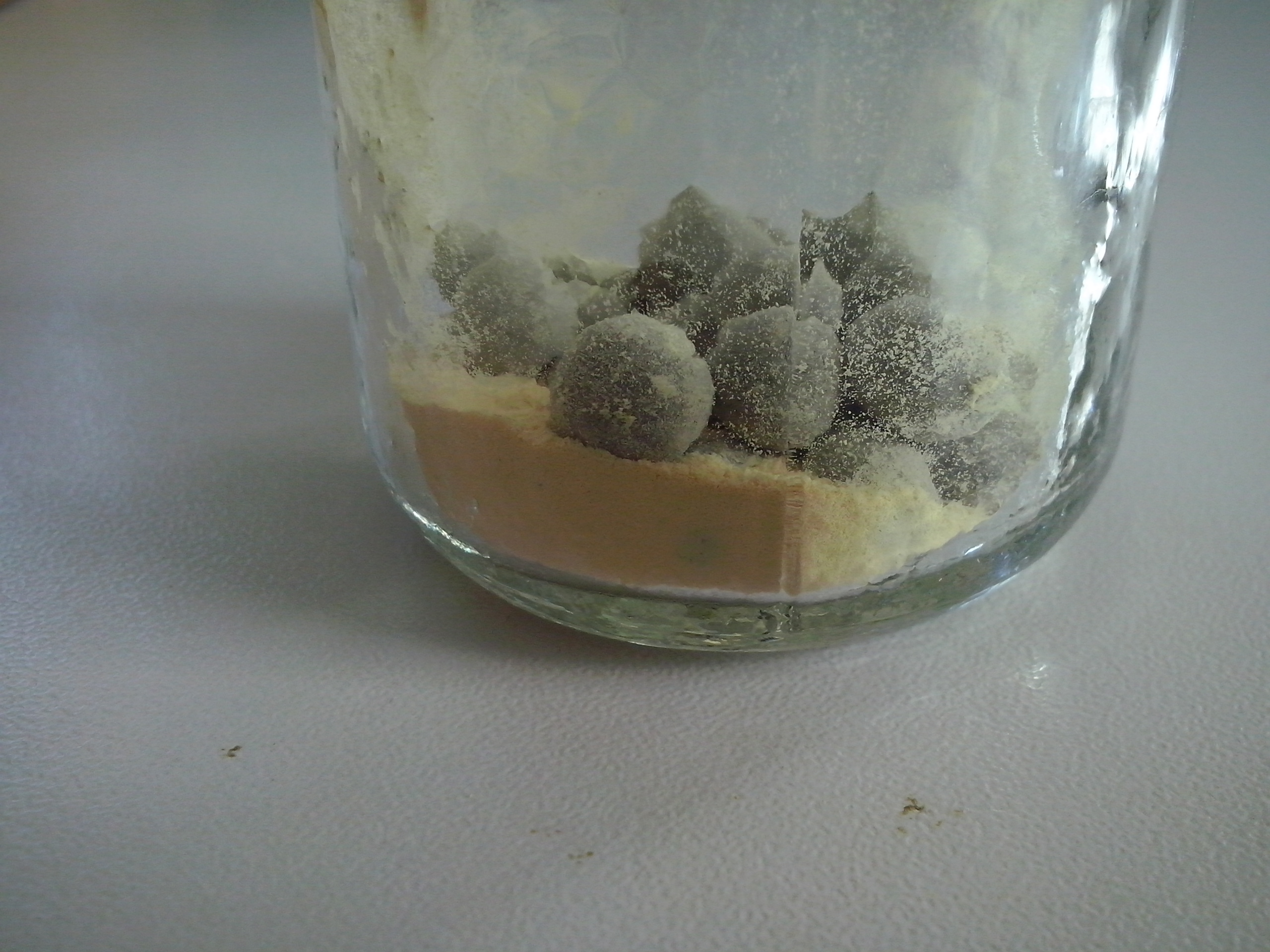 Sena zāļu forma zirnīši likopodija pulverī